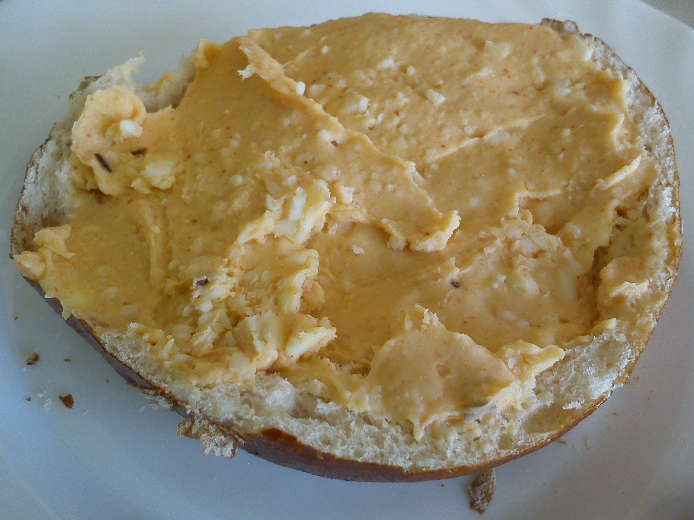 Obazta. Pasta do kanapek z Bawarii.